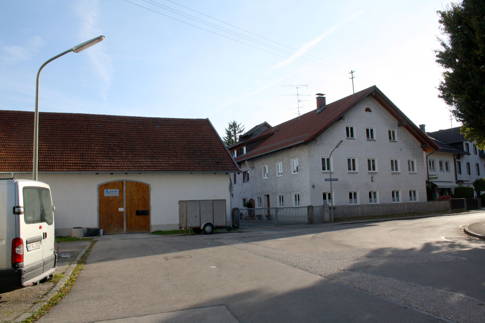 Höfe im denkmalgeschützten Ortskern von Englschalking, München